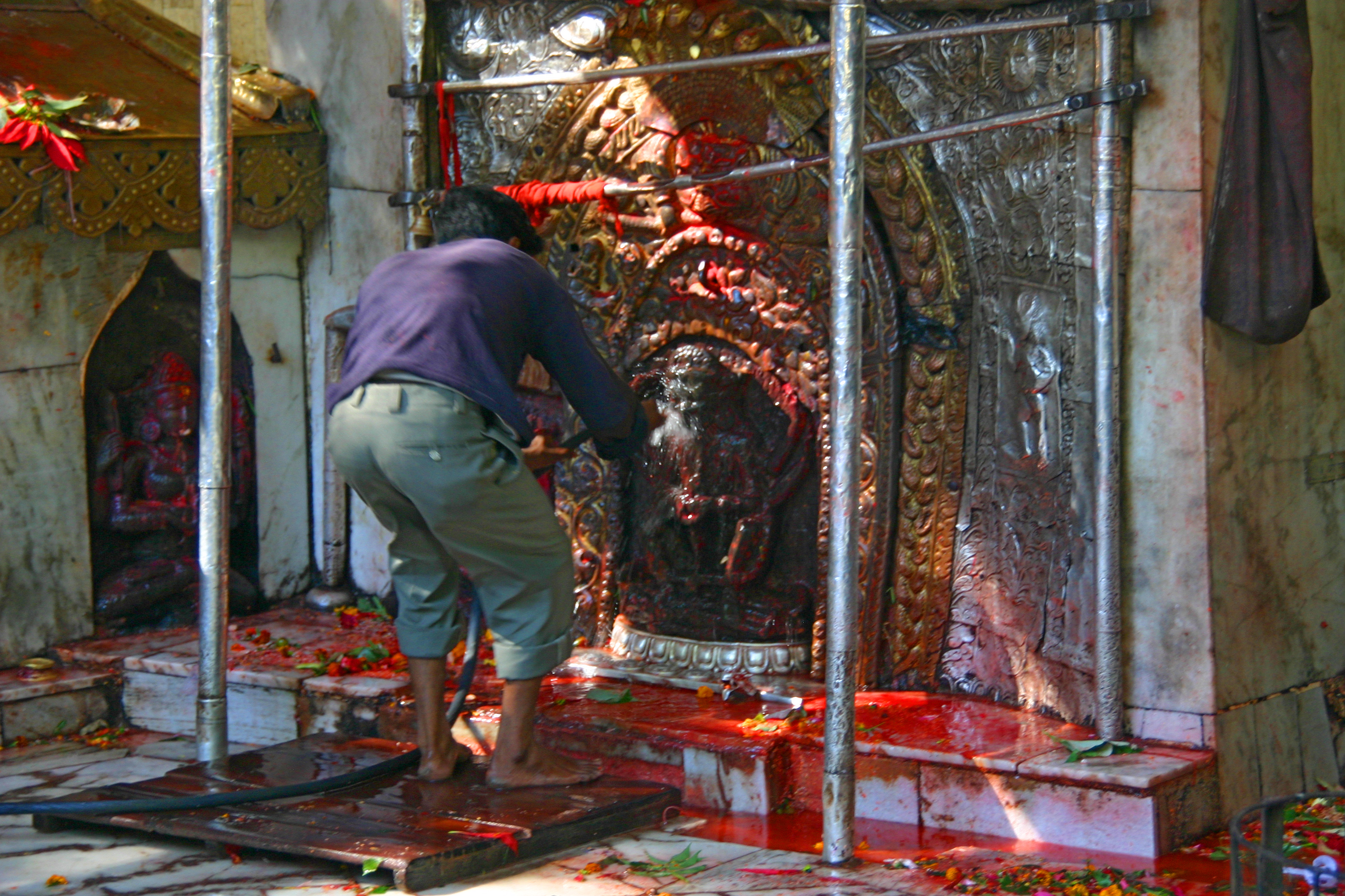 Dakshinkali, Opferschrein.